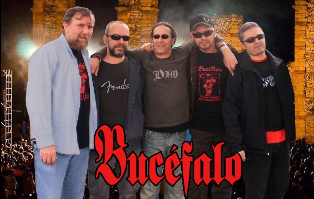 Bucéfalo. Miembros actuales.